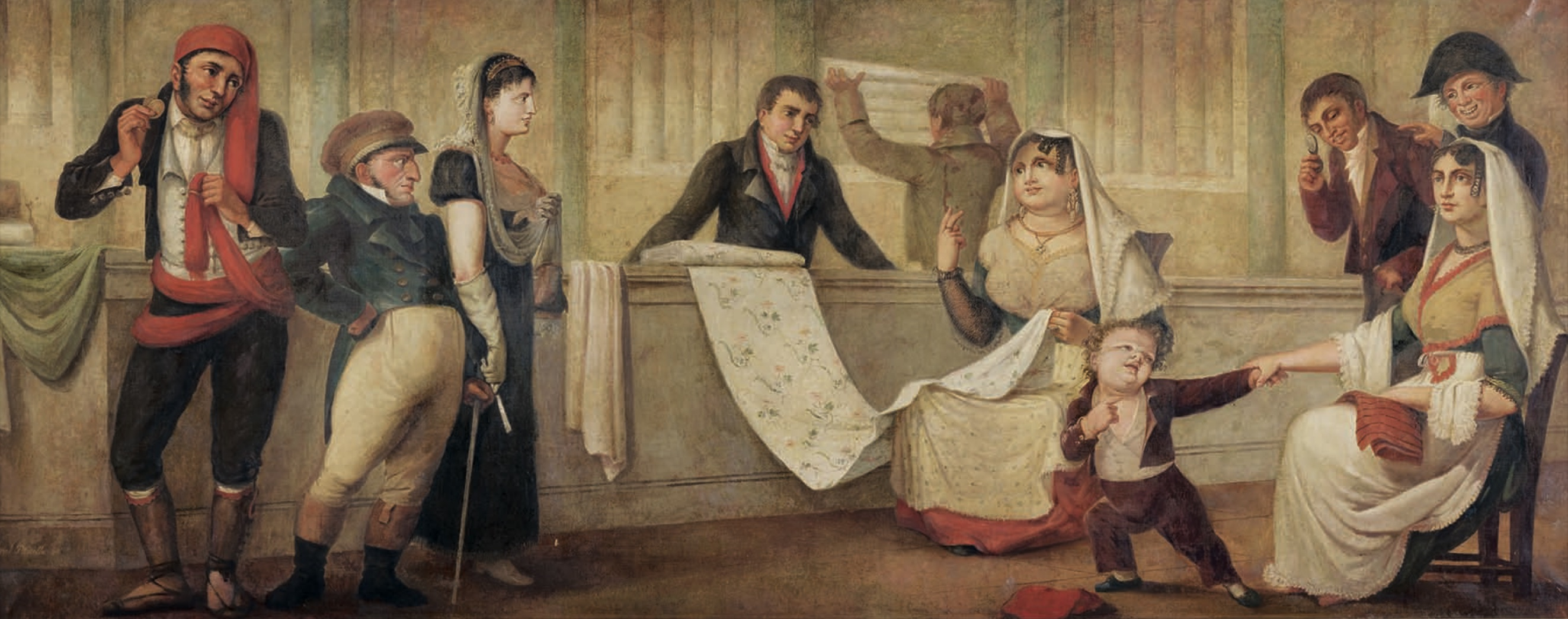 Pintura d'una botiga d'indianes. Atribuït a Gabriel Planella Conxello.